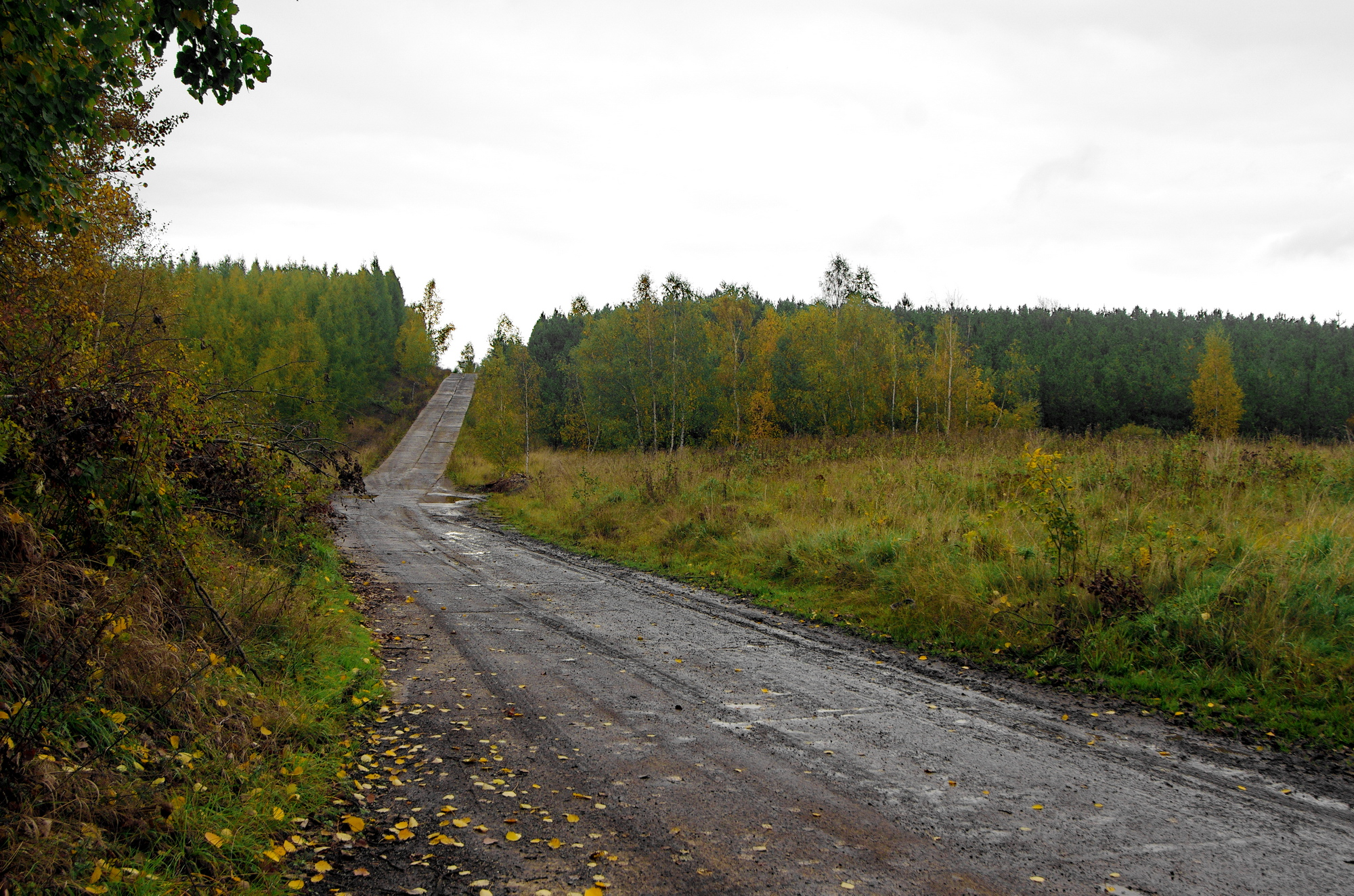 Loketská výsypka, Sokolovská pánev